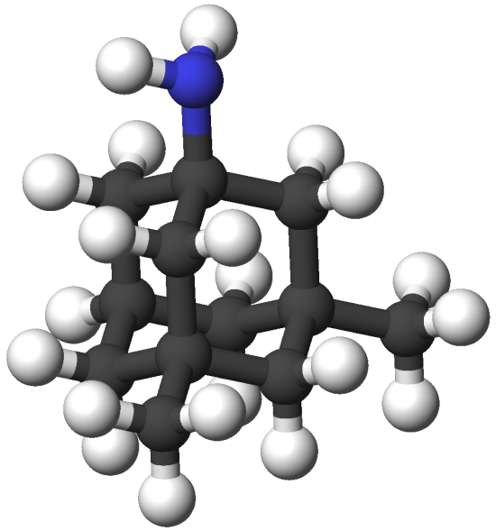 Memantine